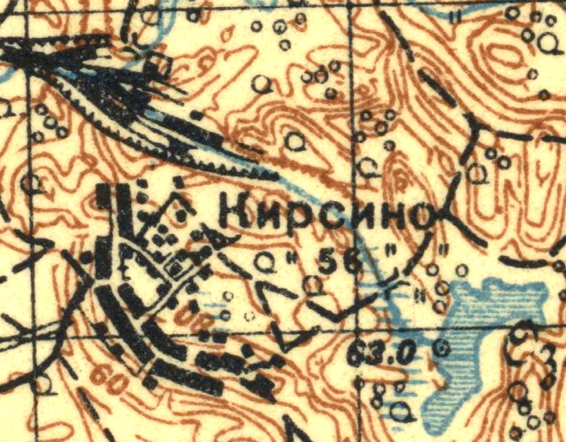 Топографическая карта Ленинградской области, квадрат О-36-15-А (Шапки), деревня Кирсино